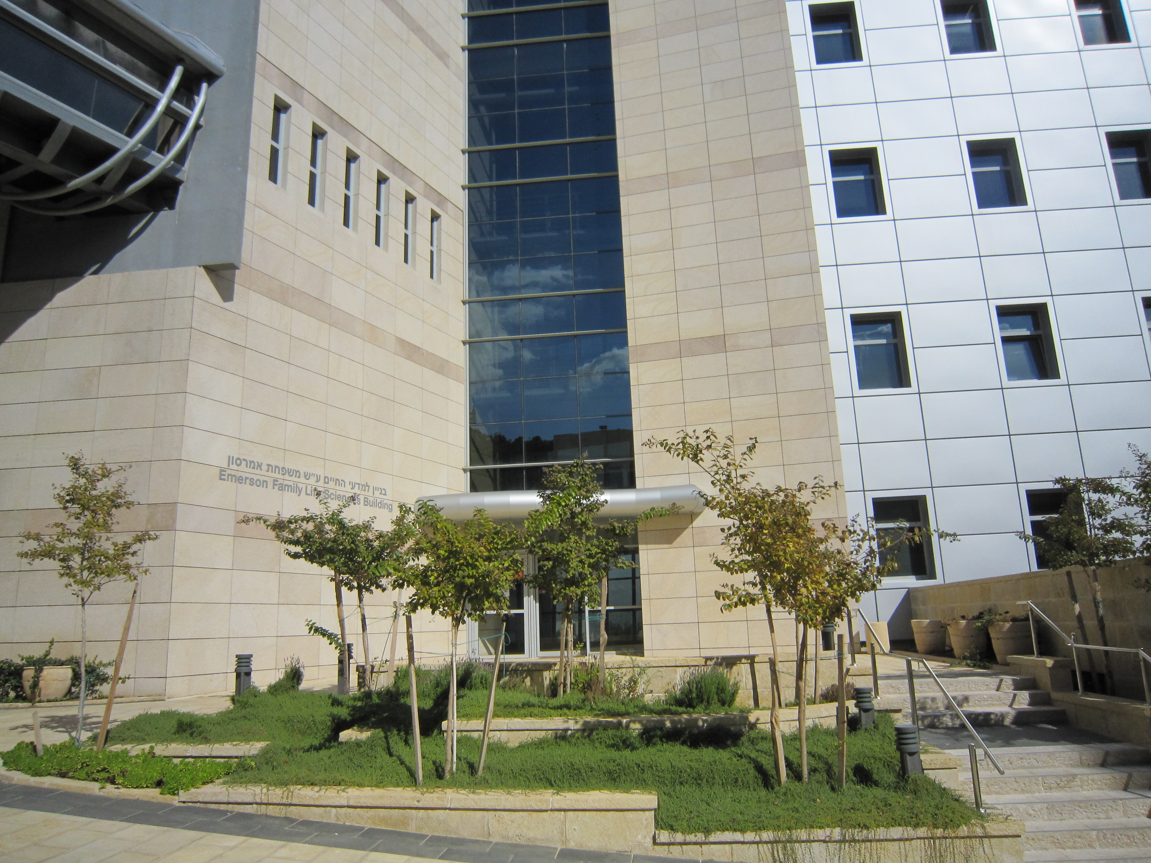 בנין הפקולטה לביולוגיה בטכניון